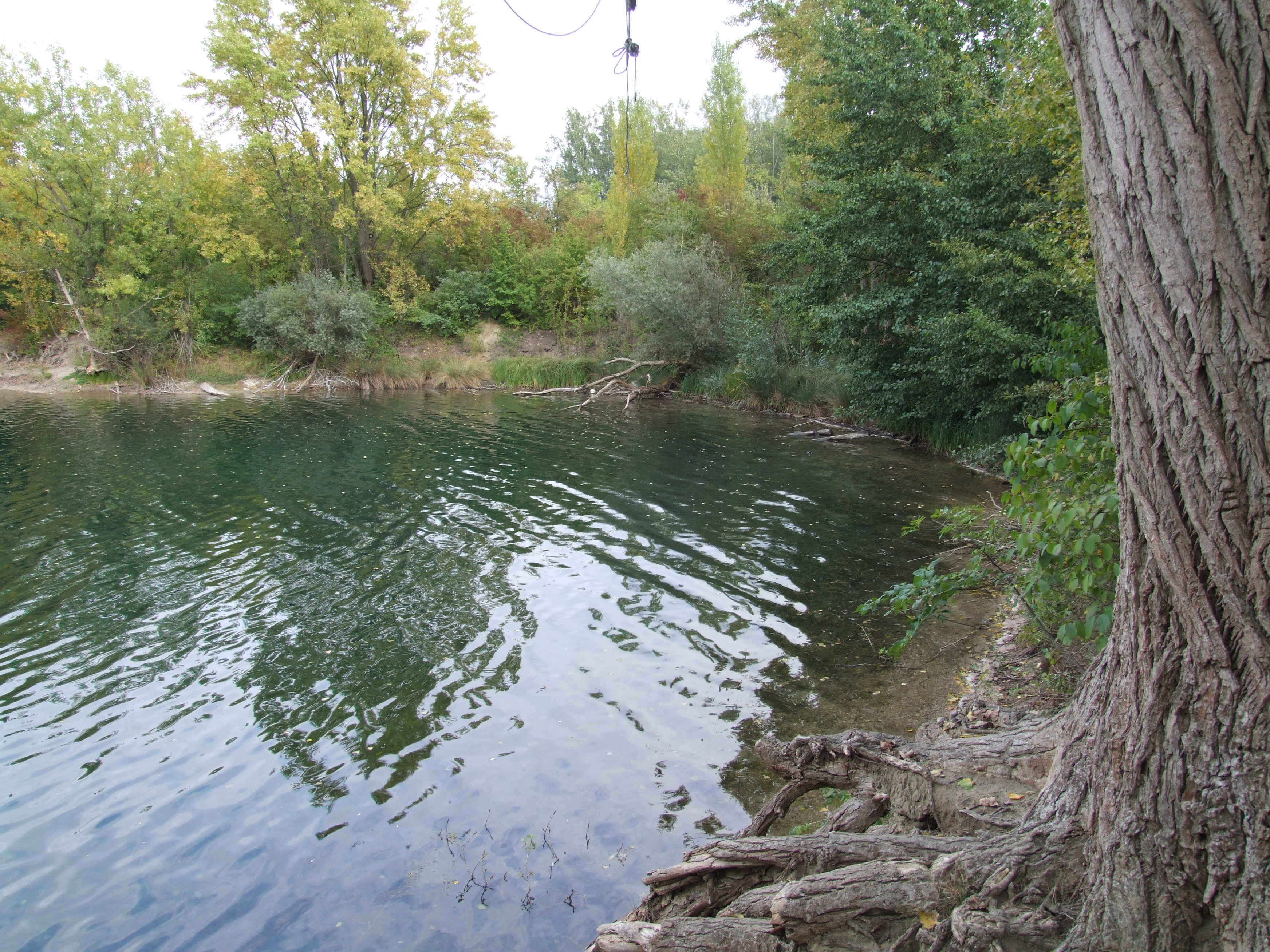 Südostecke des See Kuhunter im Binsfeld, Speyer